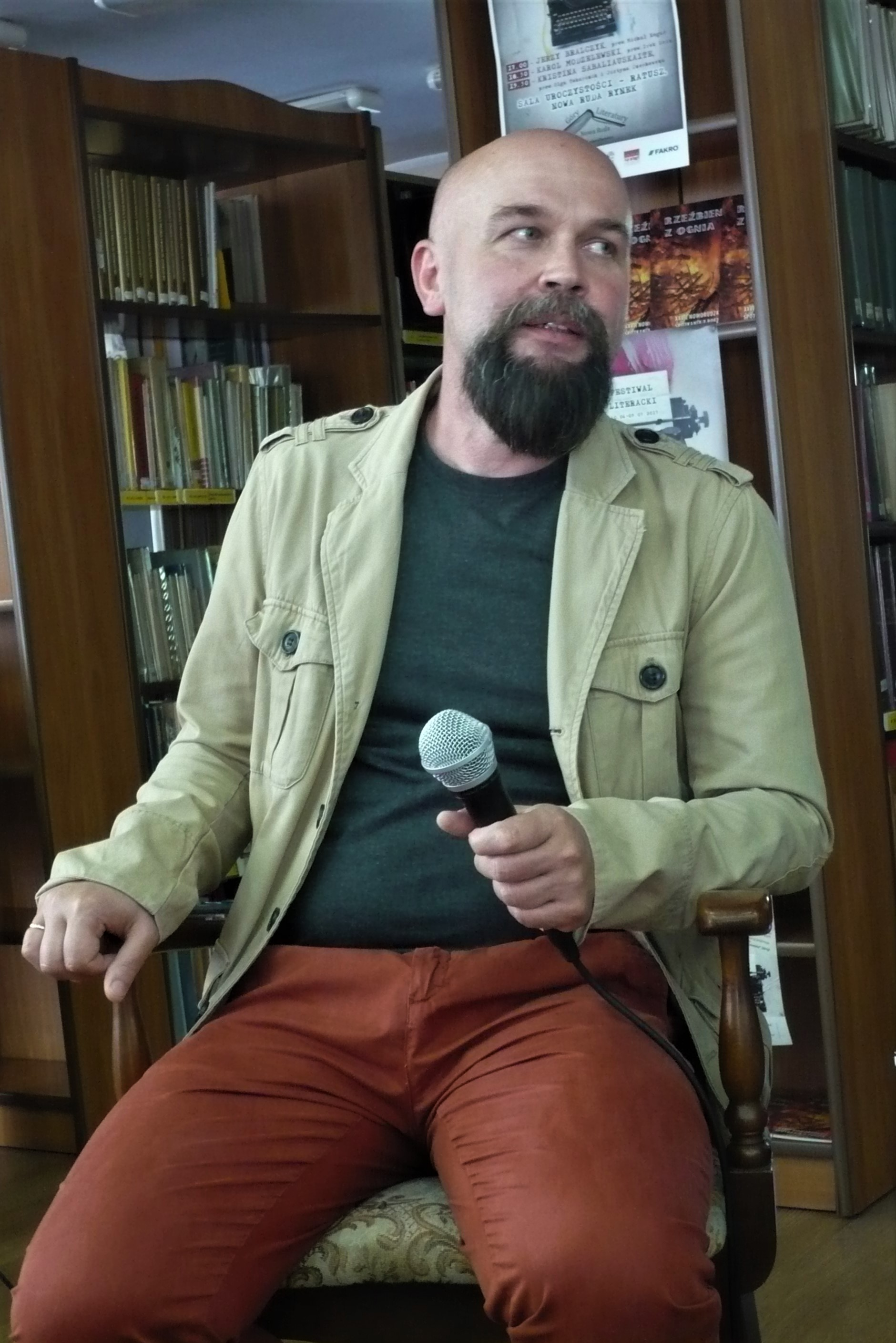 Poeta Dariusz Suska